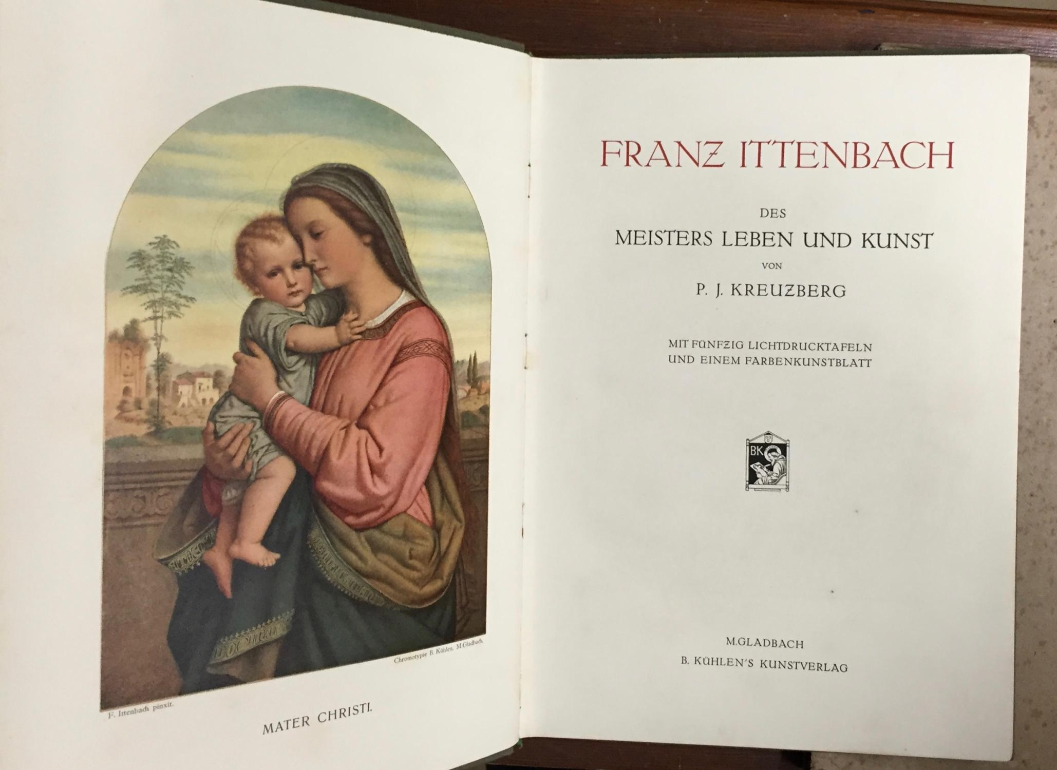 Pubblicazione: Franz Ittenbach. La vita e le opere del maestro. M. Gladbach, Colonia, 1911.